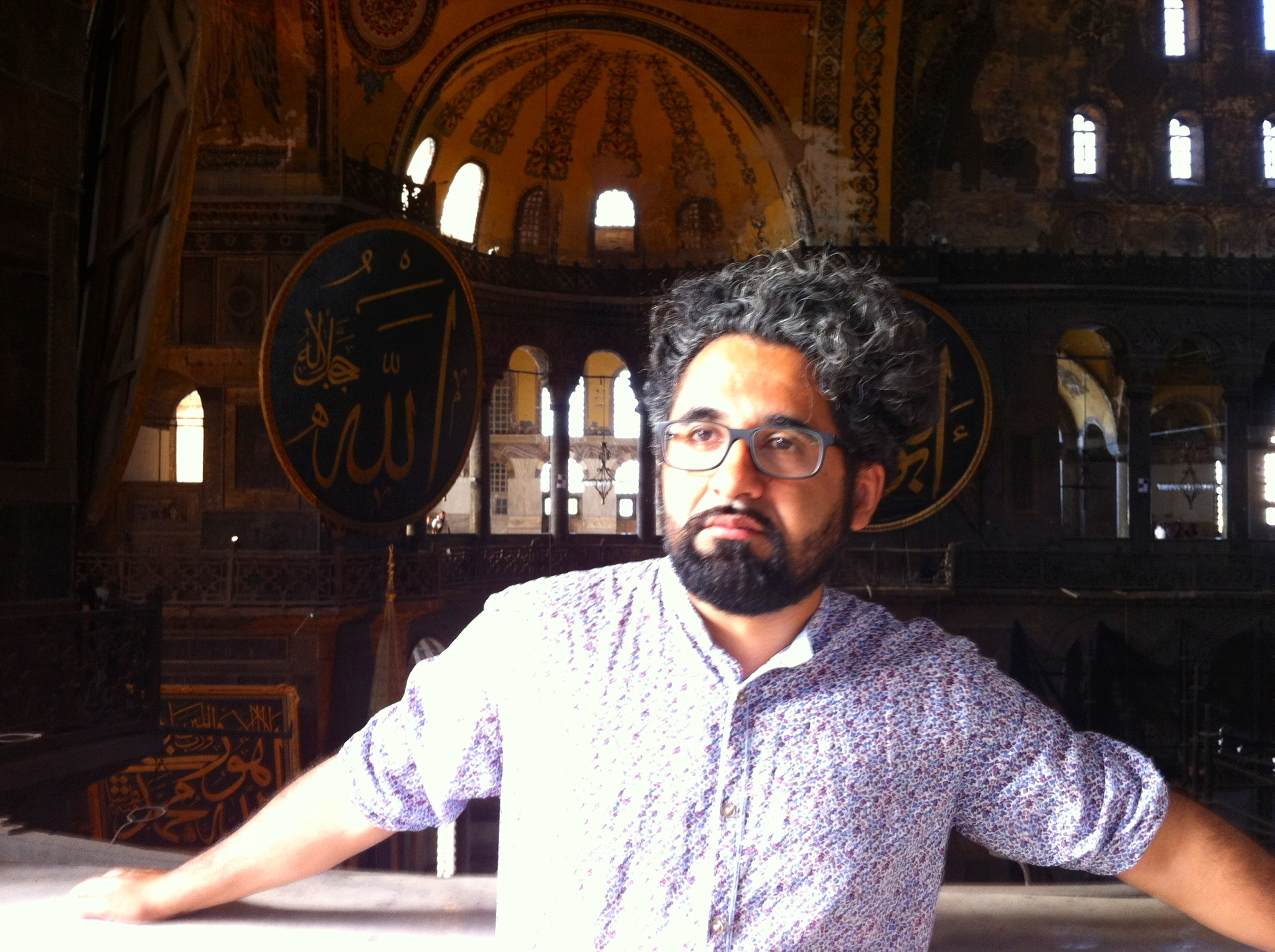 Dr. Milad Karimi